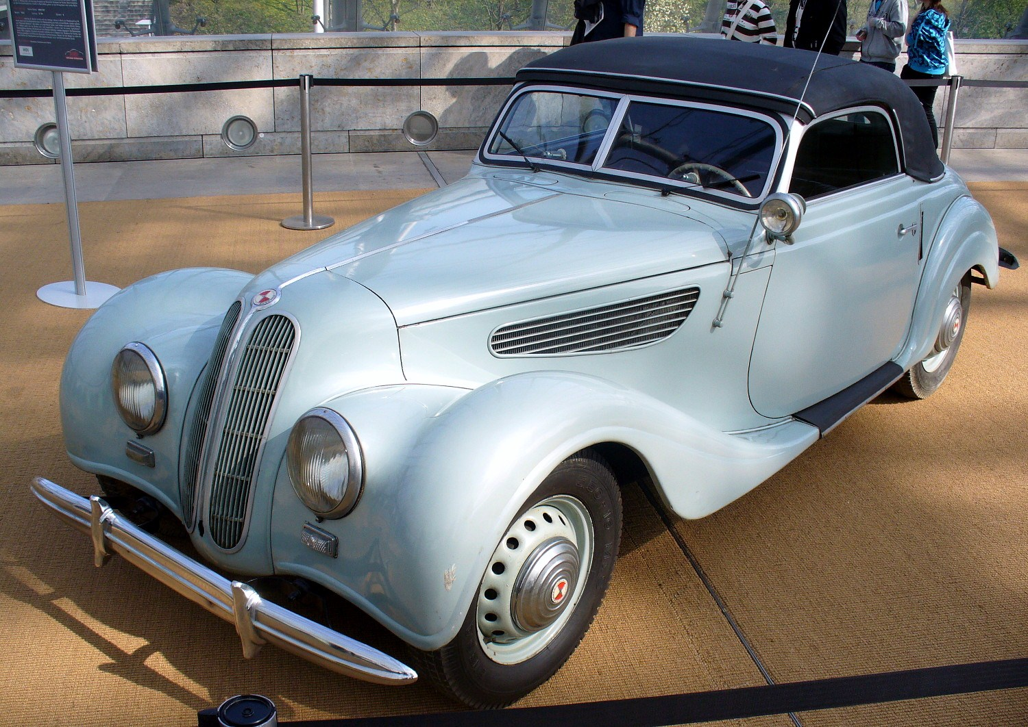 EMW 327